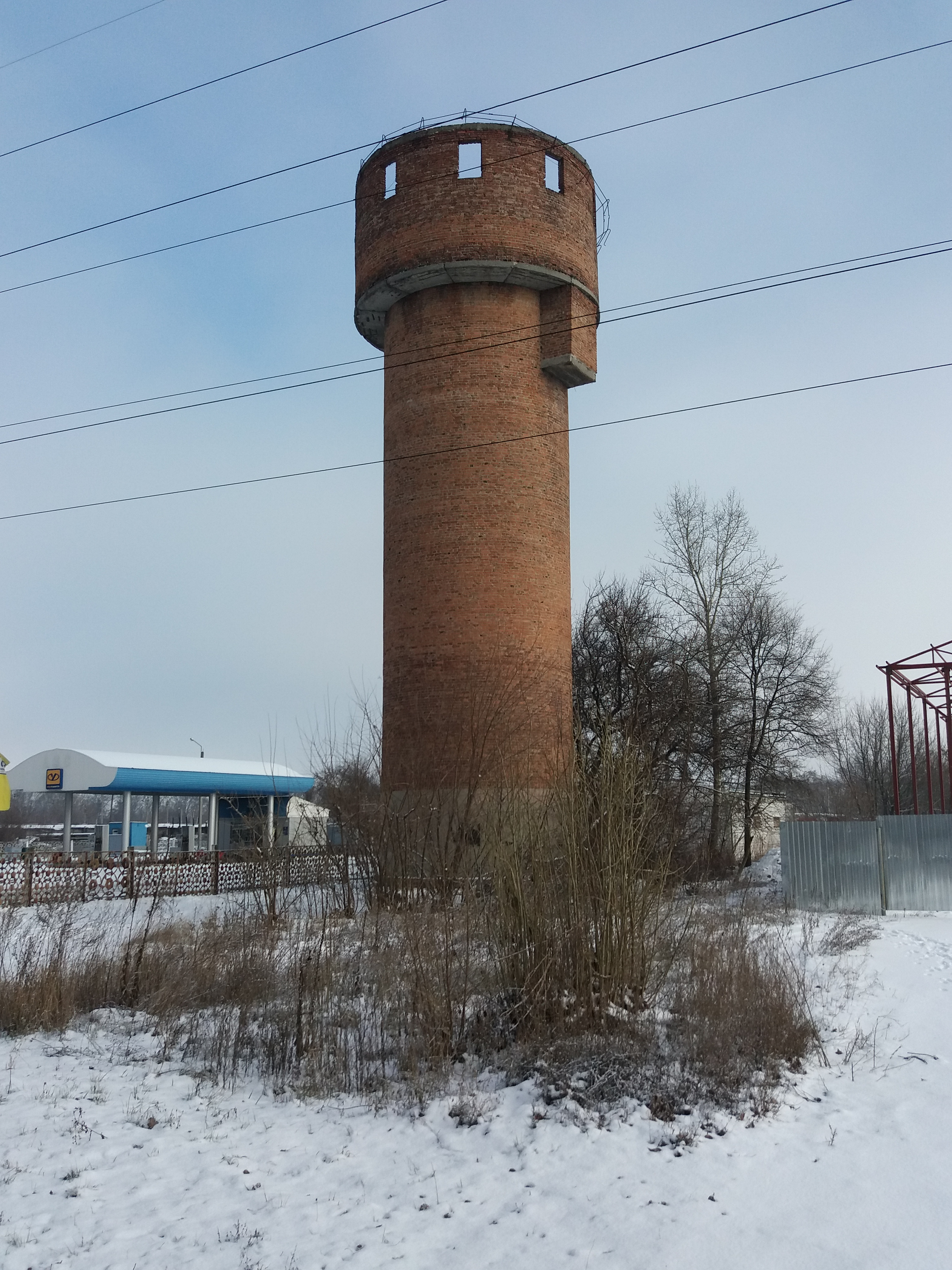 Водонапірна вежа; вул. Свіштовська (Кременчук)